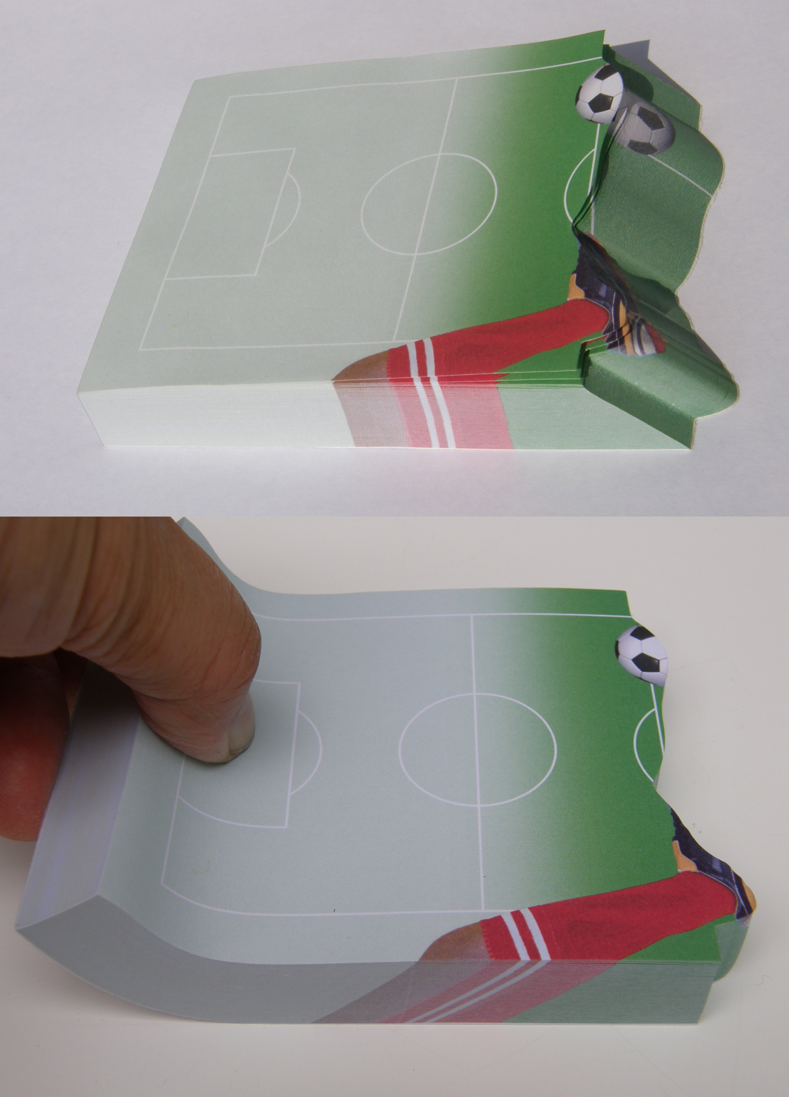 Profilschnitt an einem Notizblock, + Foredgepaint ähnlich nach Schrägschnitt bzw. hochgebogenen Block.